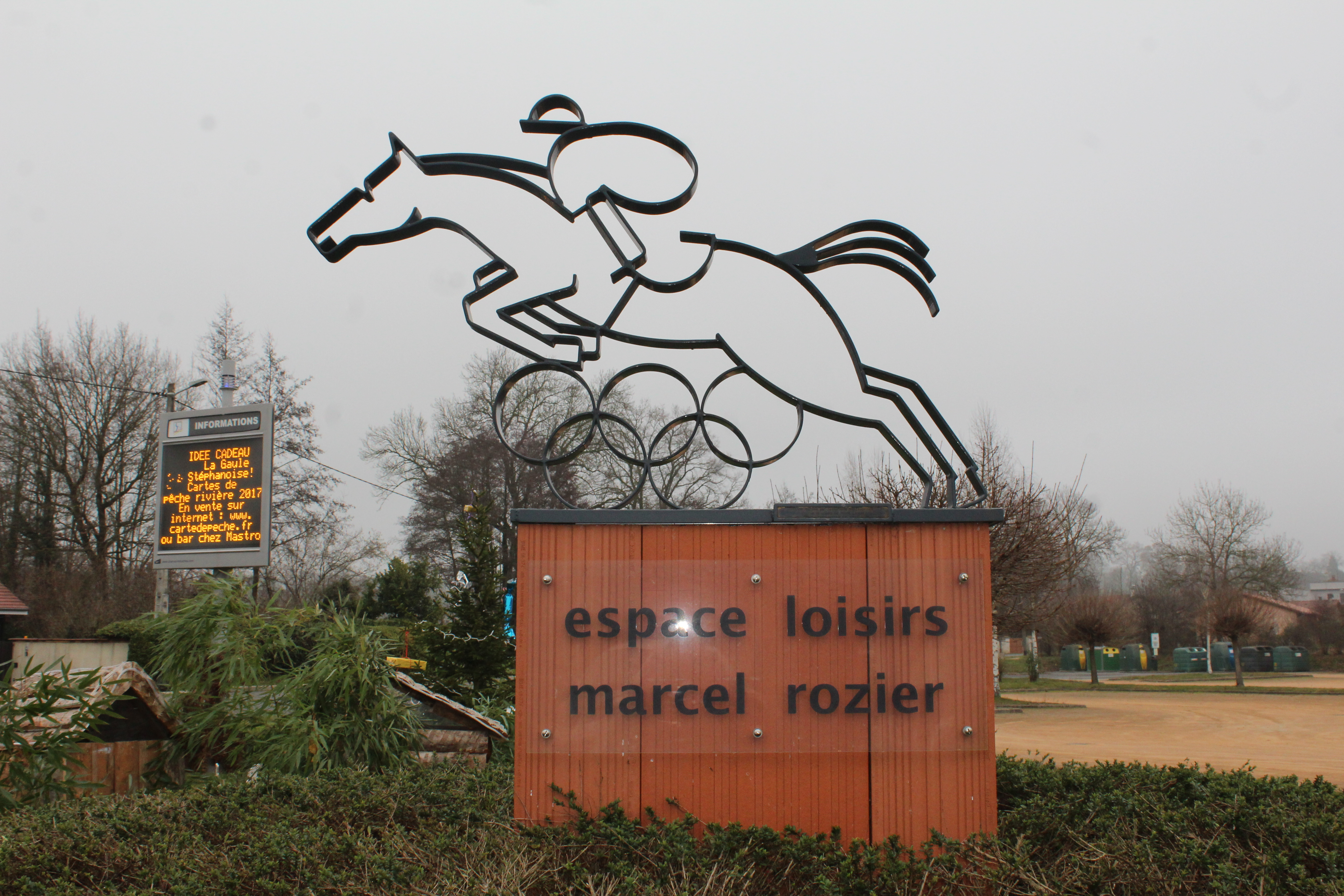 Espace loisirs Marcel Rozier à Saint-Étienne-sur-Chalaronne.